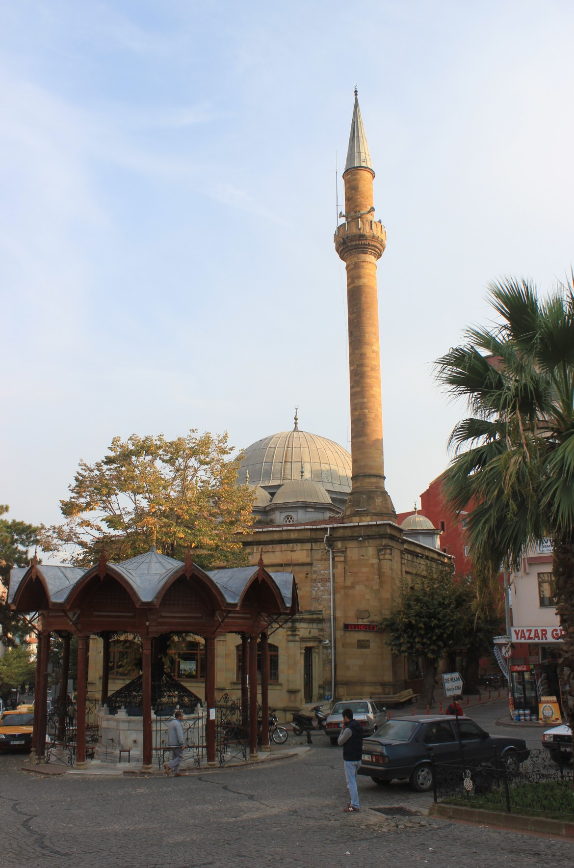 Moschee und Brunnen am zentralen Platz von Biga, Türkei.